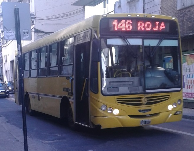 Mercedes-Benz OF 1418 de la línea 146